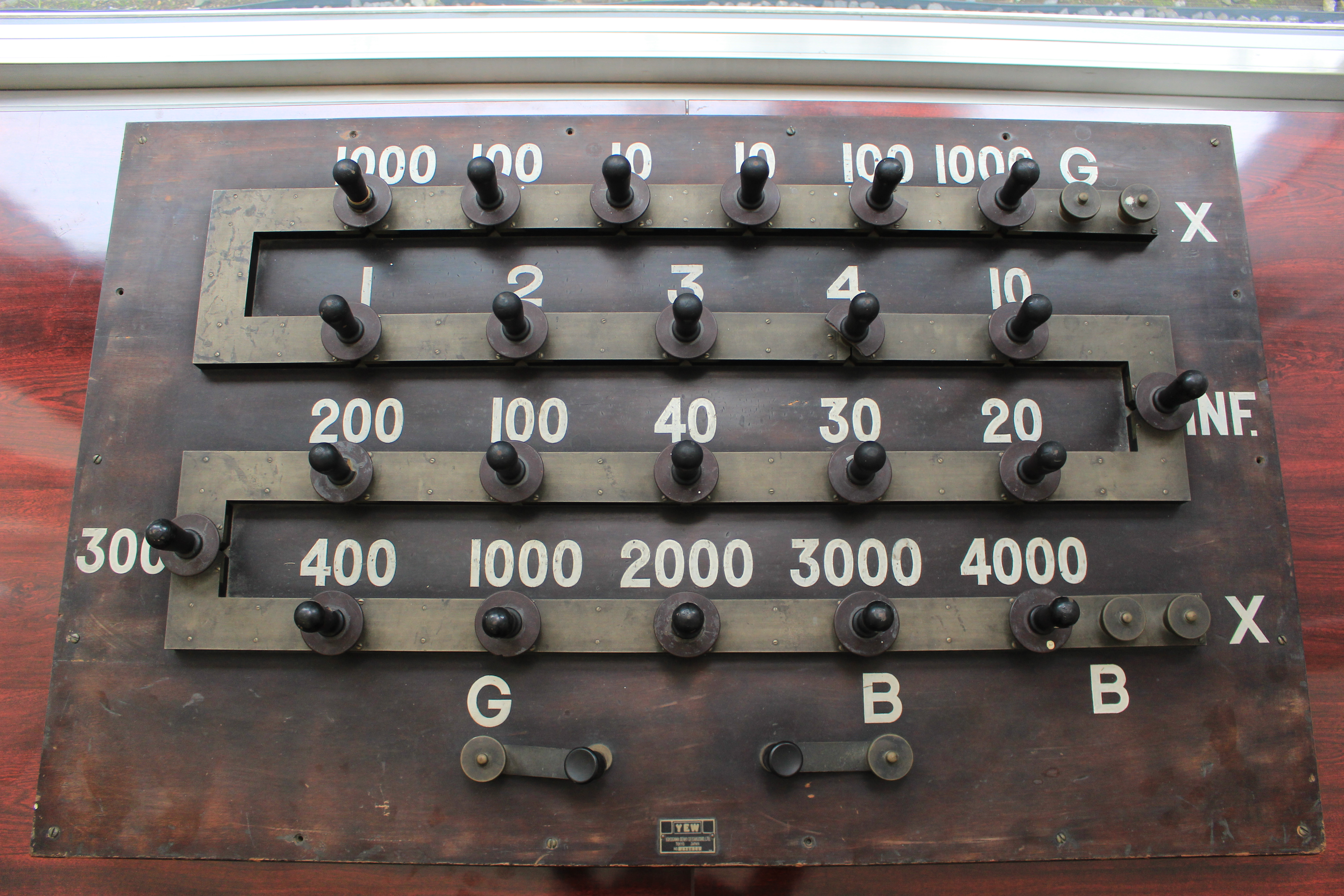 横河電機製作所製